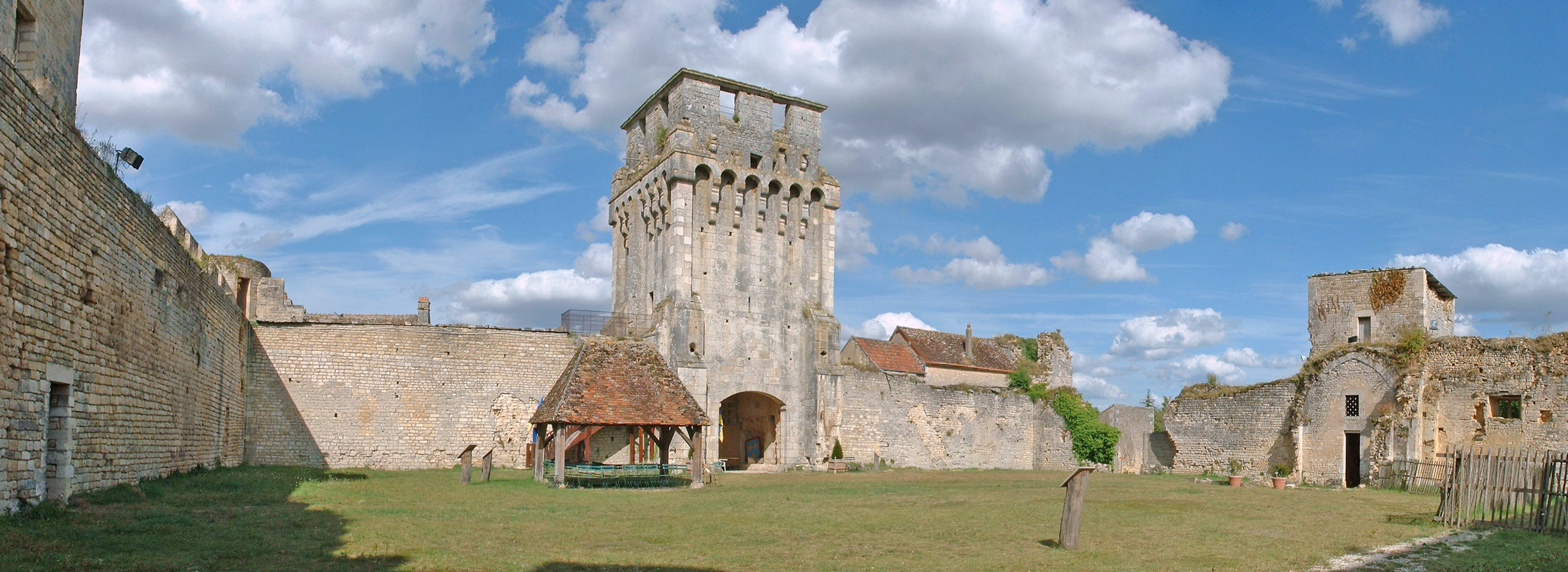 Château-fort de Druyes-les-belles-Fontaines, Yonne) - la tour-porche et le rempart depuis la cour